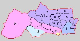 福島県岩瀬郡の町村。